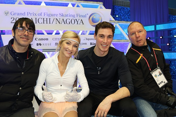 Победители финала Гран-при Алёна Савченко и Бруно Массо в "уголке слёз и поцелуев" с тренерами